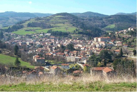 vue panoramique.jpg